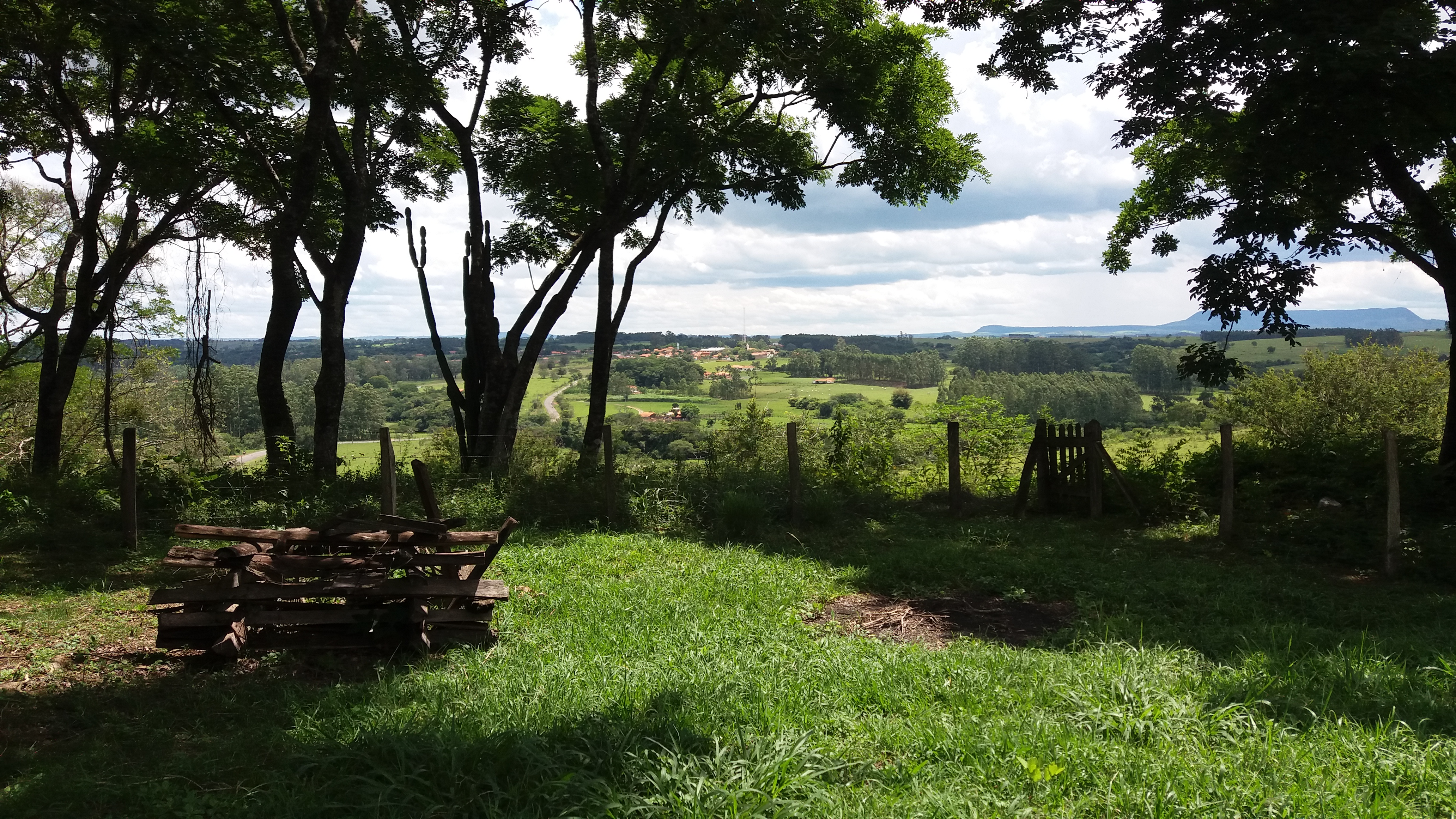 Este bairro está situado a 12Km da cidade de Conchas.